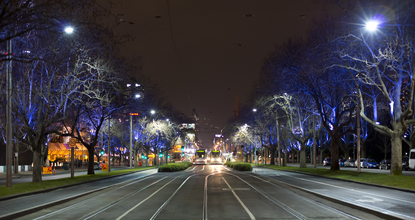 St Kilda Road